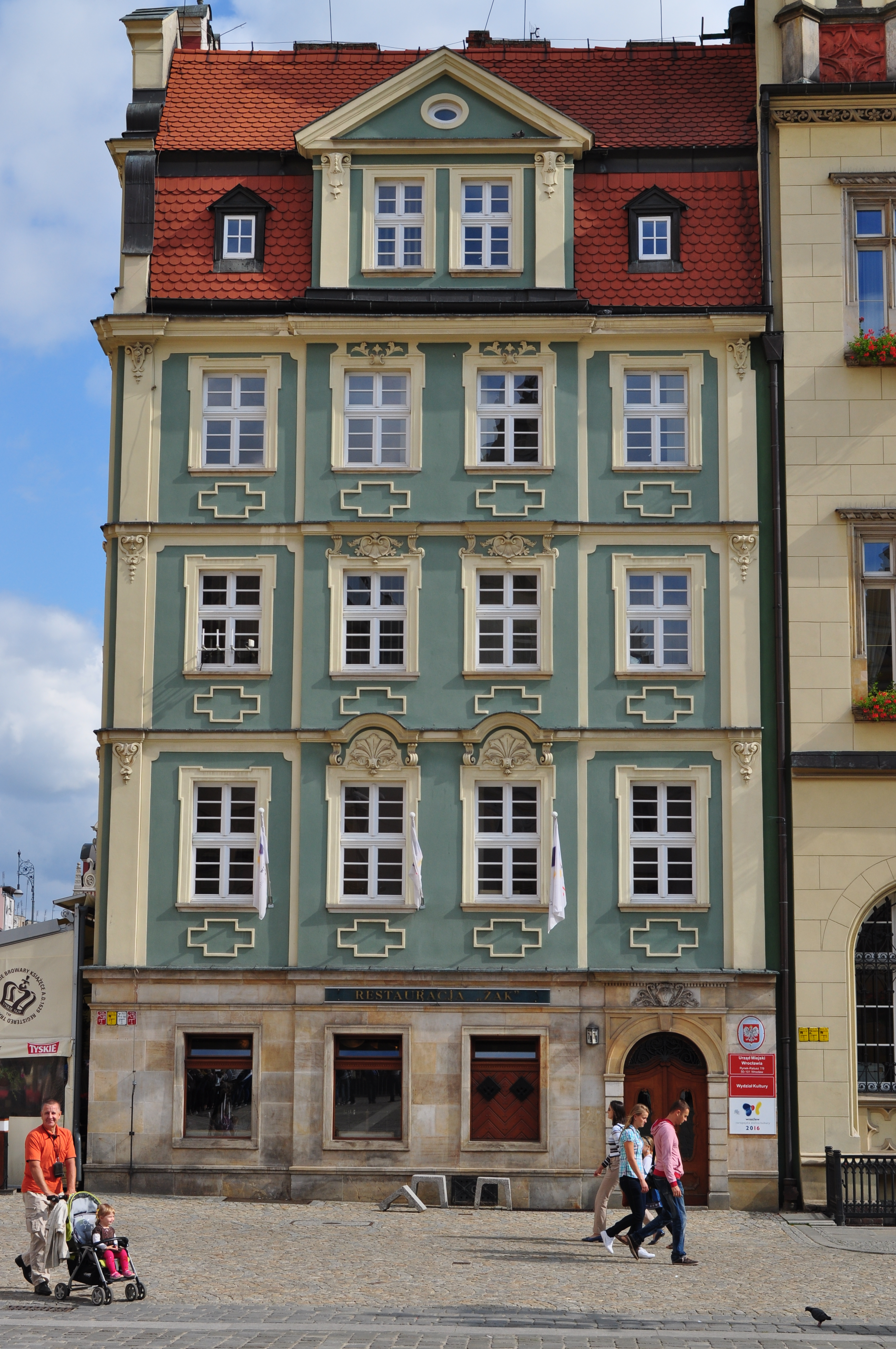 Kamienice Rynek-Ratusz 7, 8, 9, Miasto Wrocław - Stare Miasto